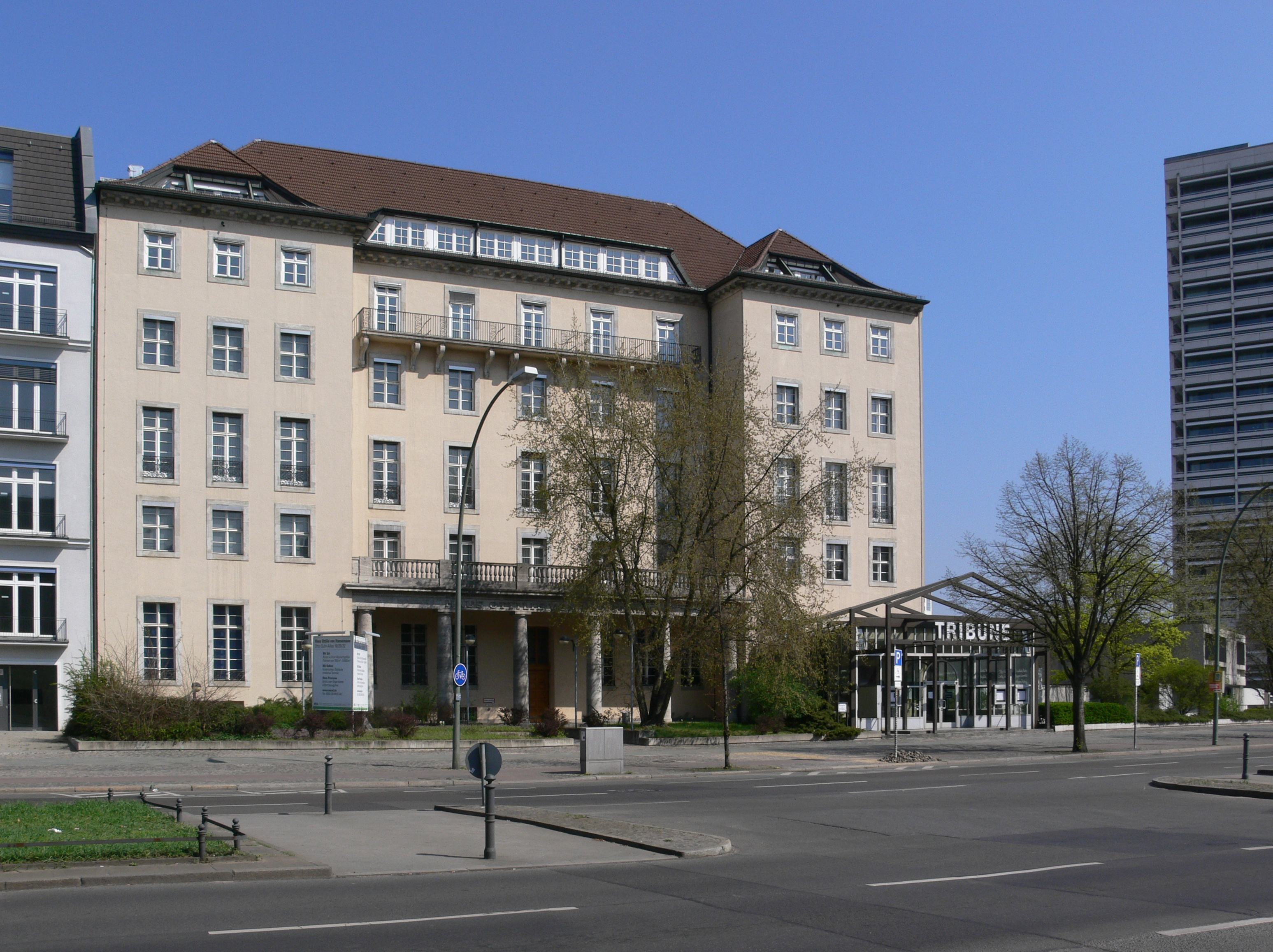 Das 2008 geschlossene Theater "Tribüne", Otto-Suhr-Allee, im April 2009.